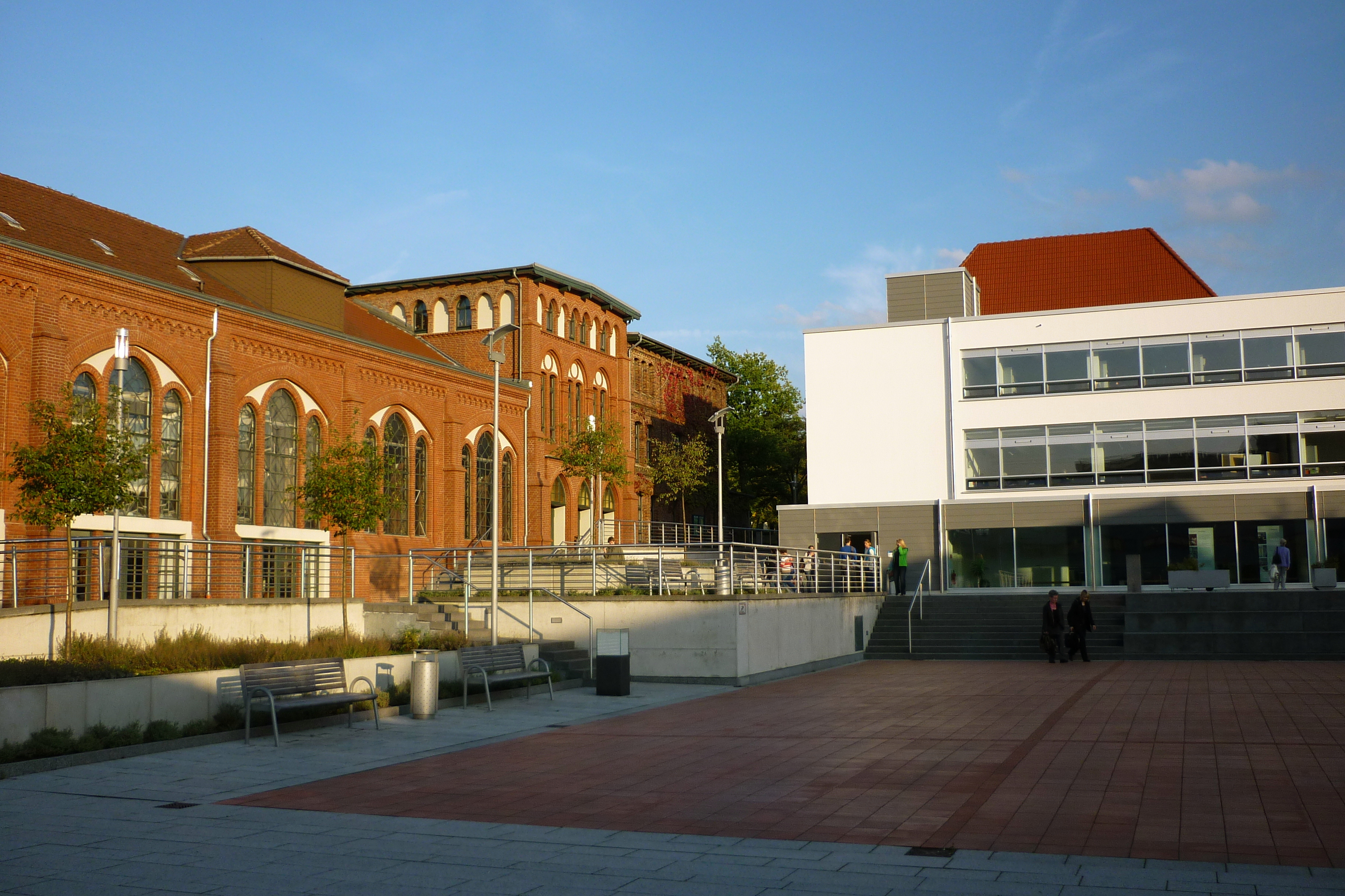 Bielefeld-Gadderbaum. Bethelplatz mit Tagungszentrum "Assapheum" und Landeskirchenarchiv.